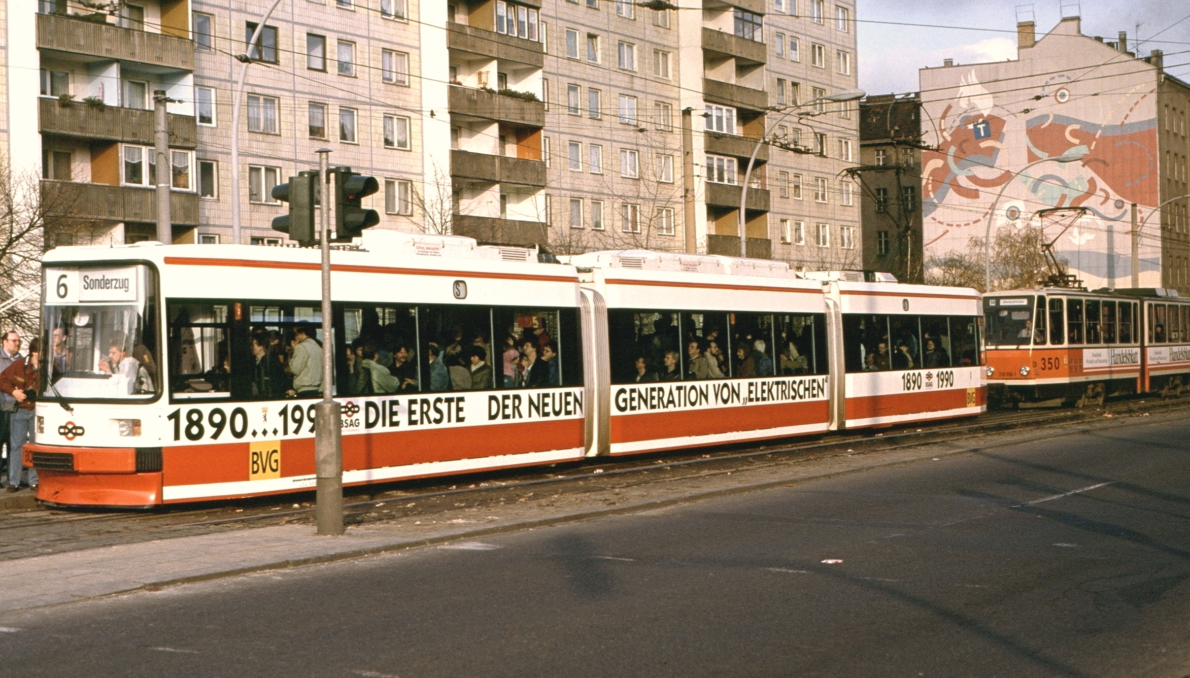 Bremer GT6N in Berlin Landsberger Allee